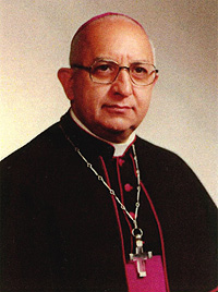 Foto usada para presentarlo como obispo de la Diócesis de Buga